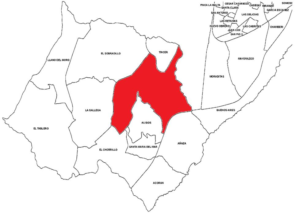 Localización de Barranco Grande en el distrito Suroeste